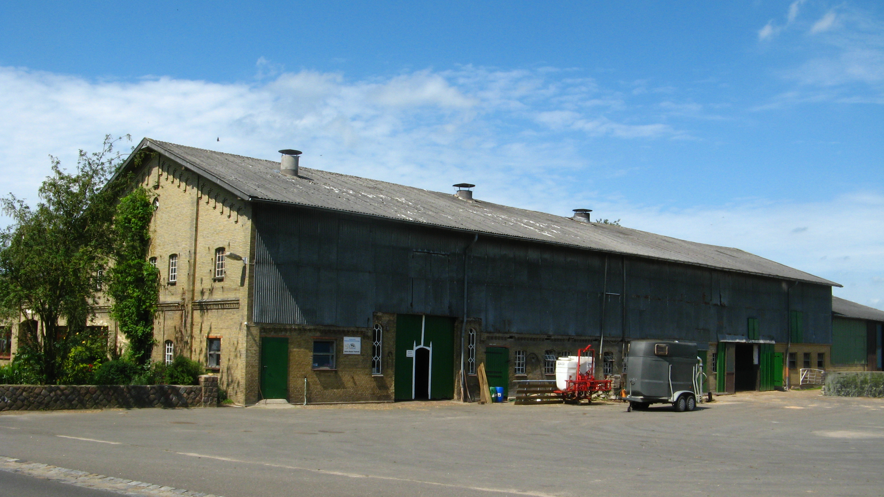 Bärn in Hövede